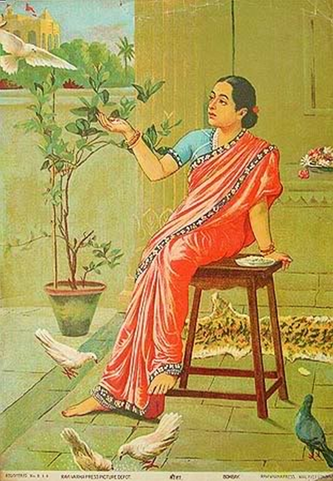 sita devi